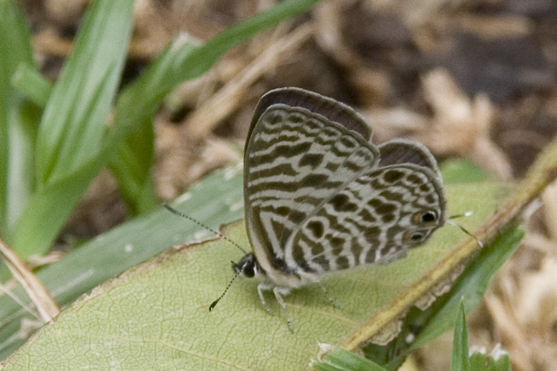 Leptotes babaulti (Stempffer, 1935), Babault's Zebra Blue